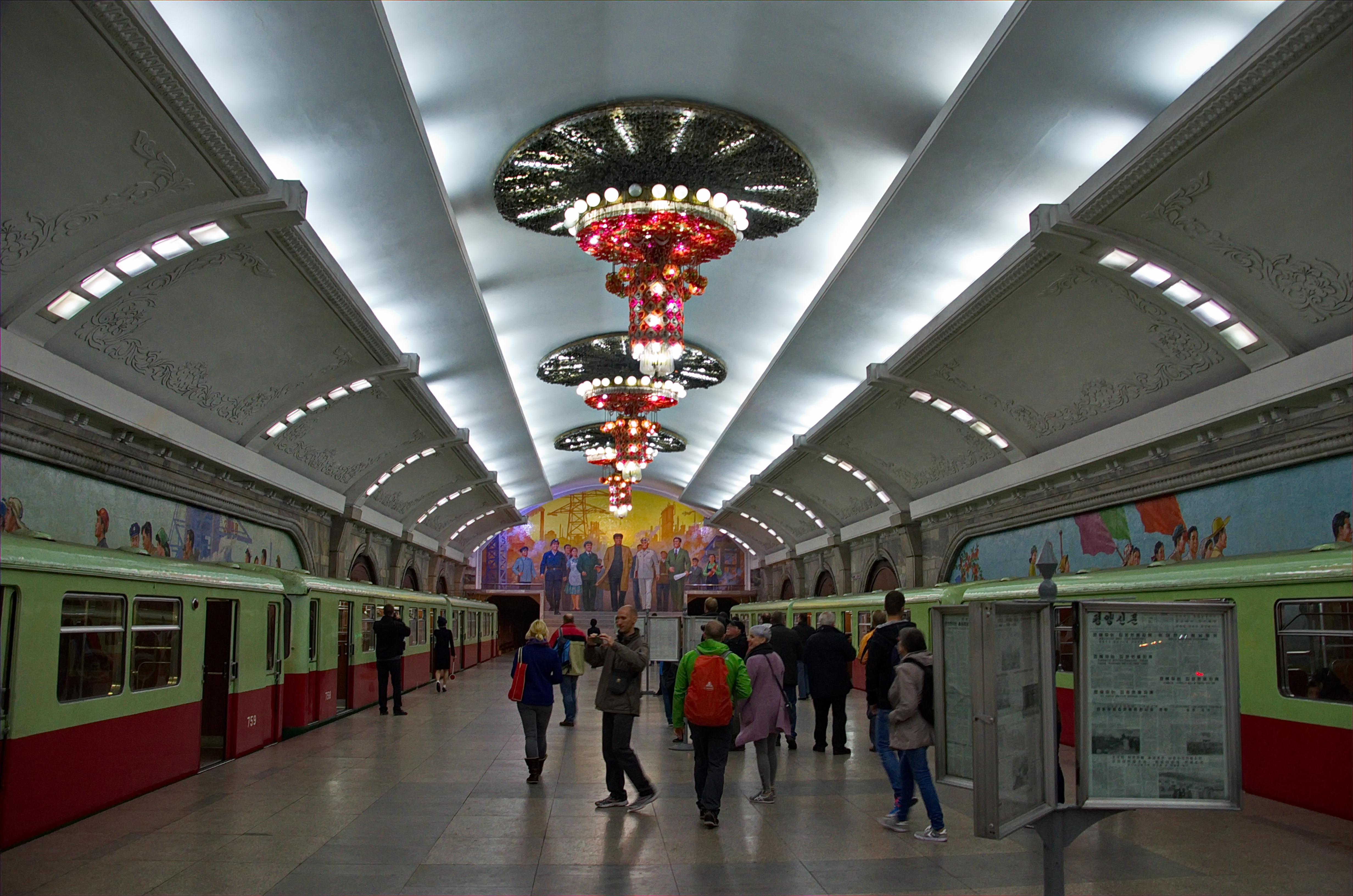 Nordkorea 2015 - Pjöngjang - Metro